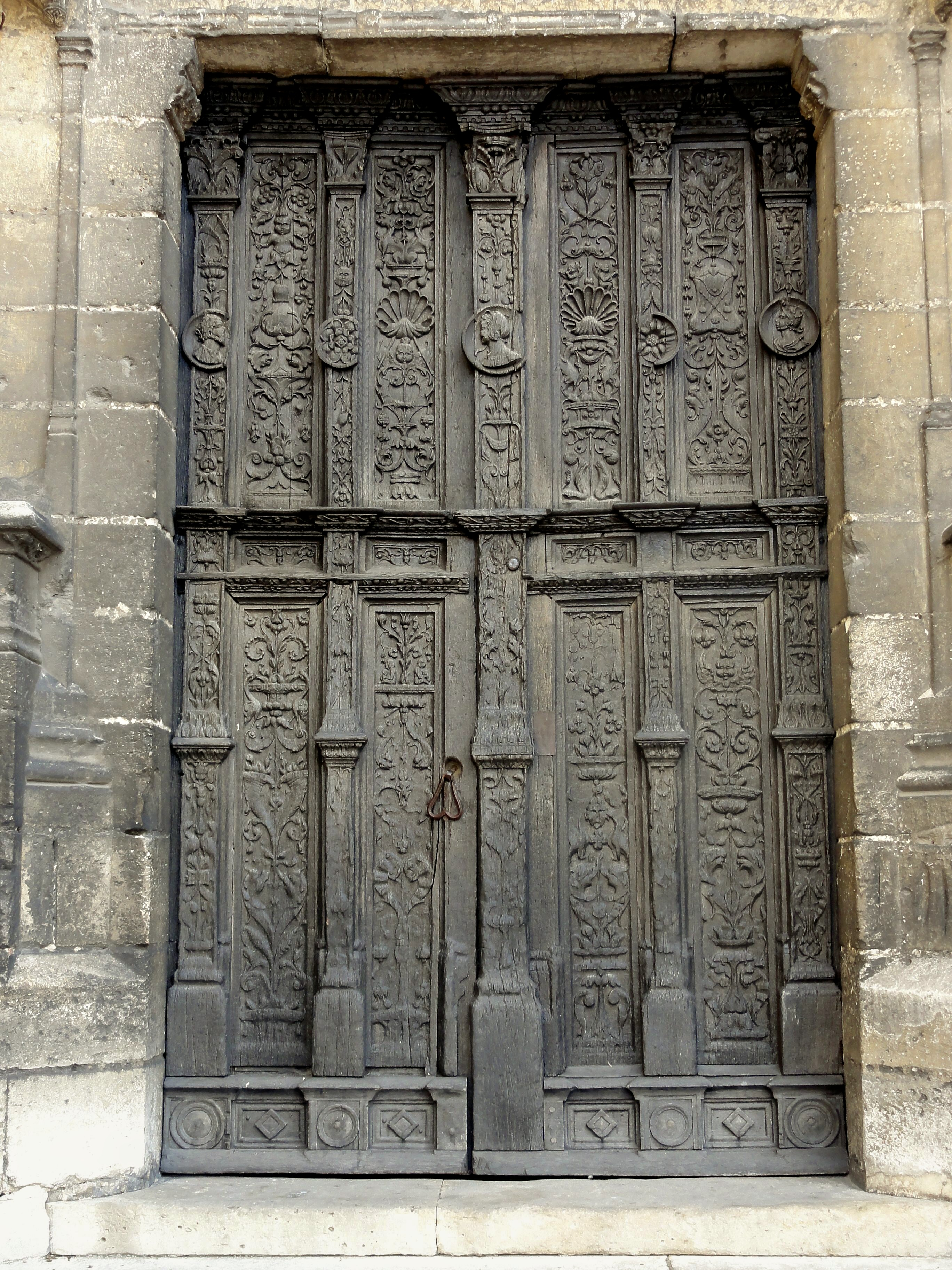 Vantaux Renaissance du portail occidental.